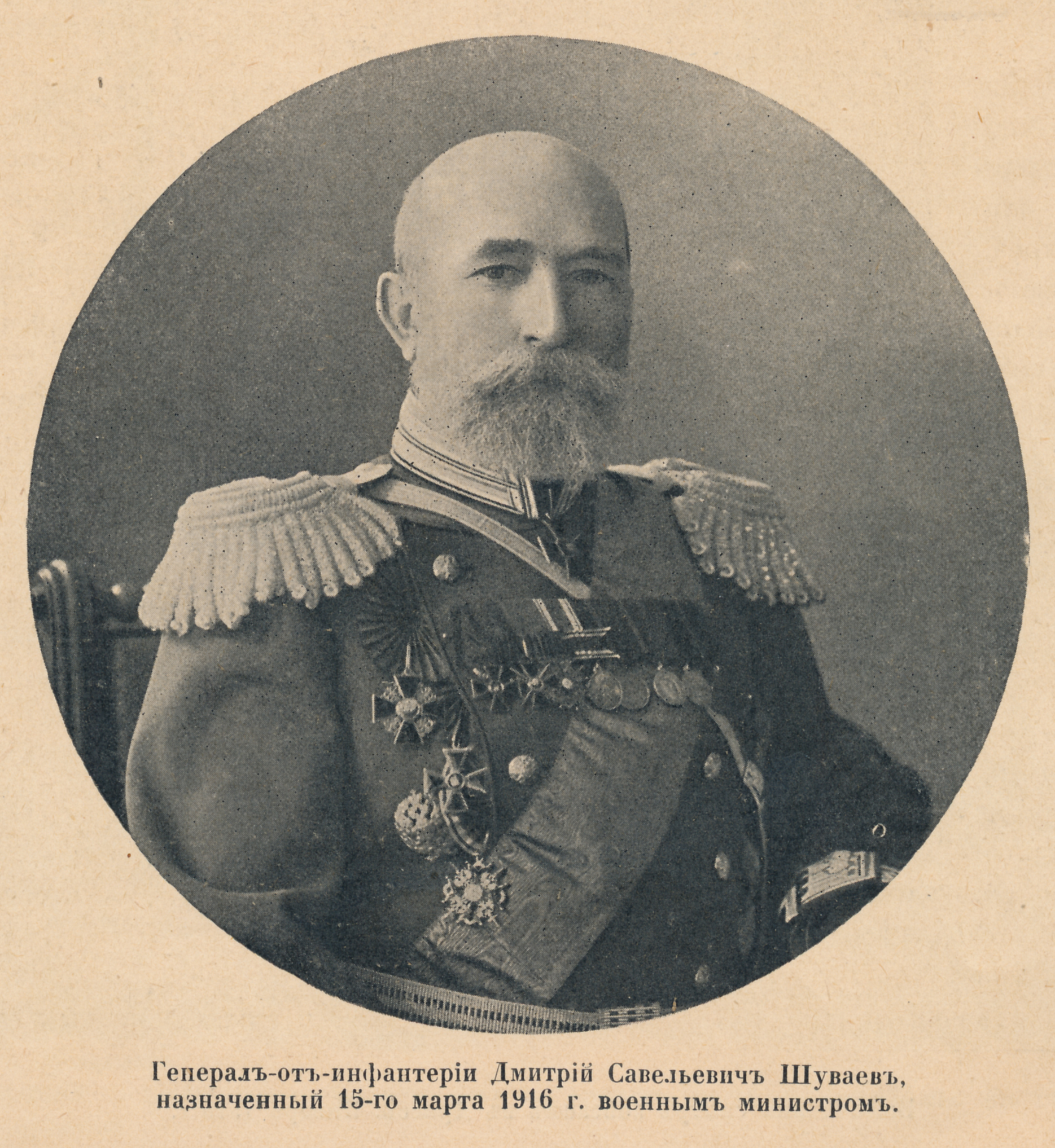 Фото генерала Д.С. Шуваева в журнале "Летопись войны", 1916 год.